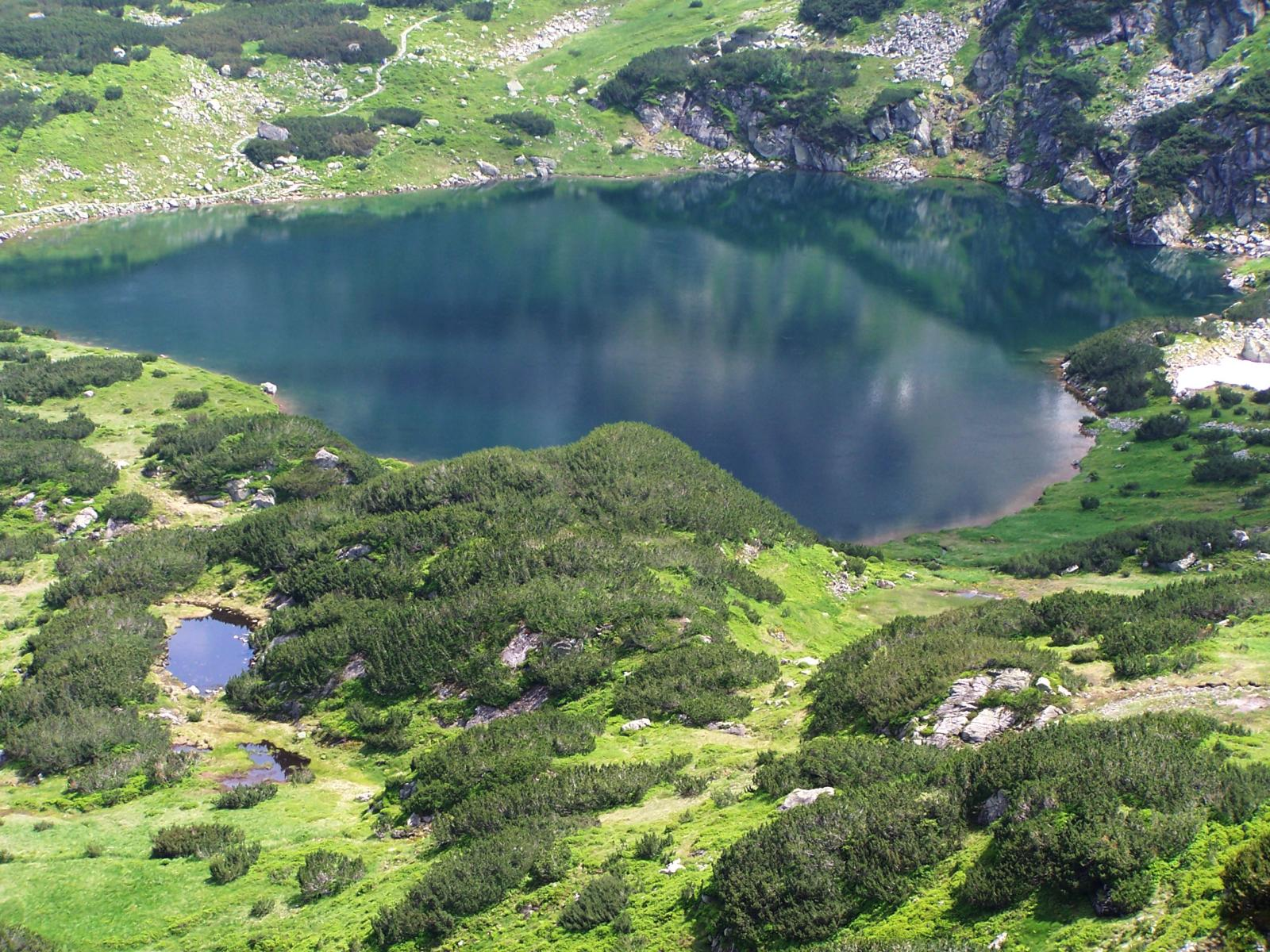 Zielony Staw Gąsienicowy (Tatra Mountains)